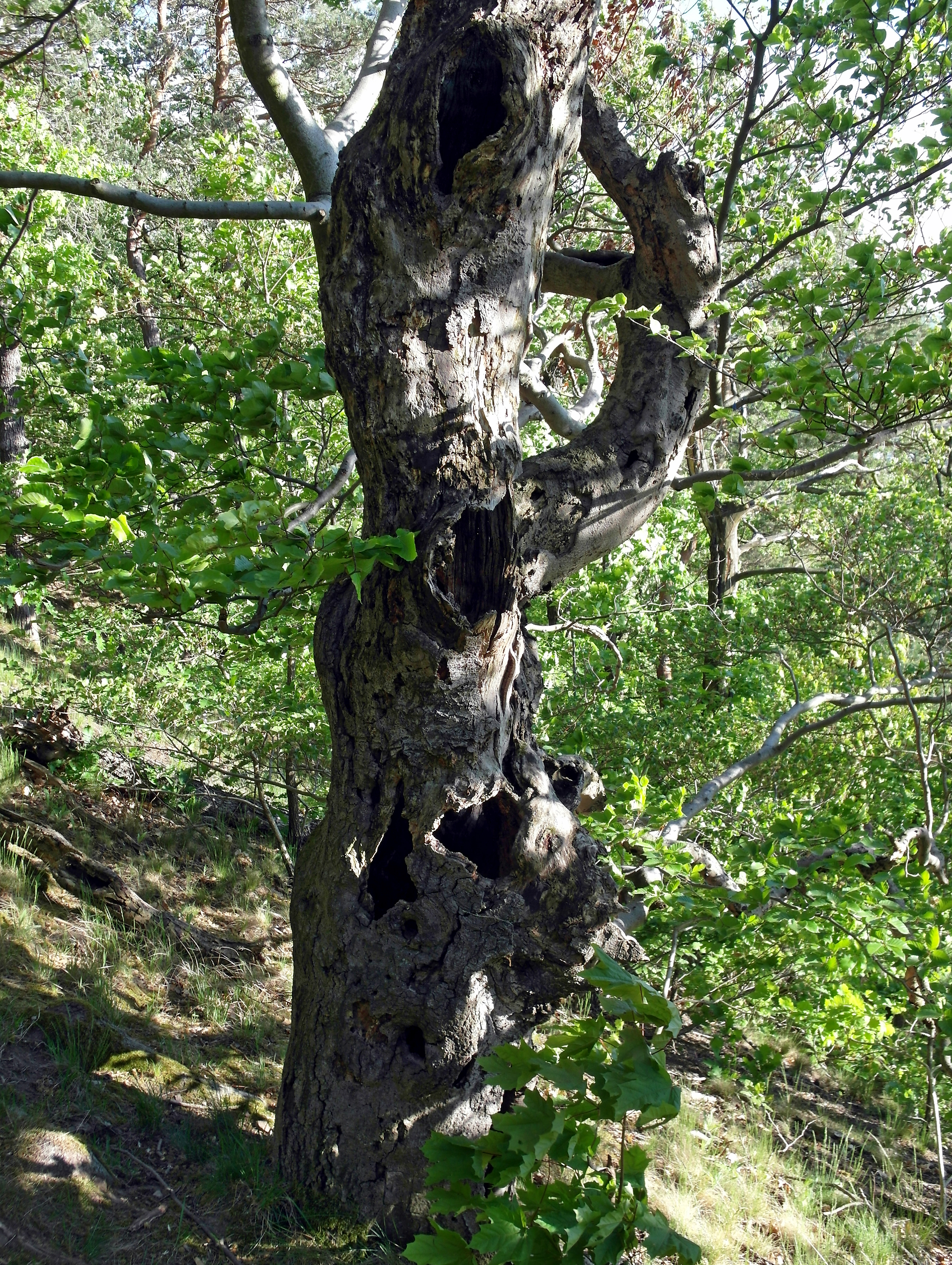 01.05.2018 01705 Pesterwitz (Freital), Am Burgwartsberg: Seit 2011 Landschaftsschutzgebiet (LSG). Abgestorbener Baum etwa bei GMP: 51.020748,13.647819 mit nützlichen Bruthöhlen für Tiere. [SAM5803.JPG]20180501210DR.JPG(c)Blobelt